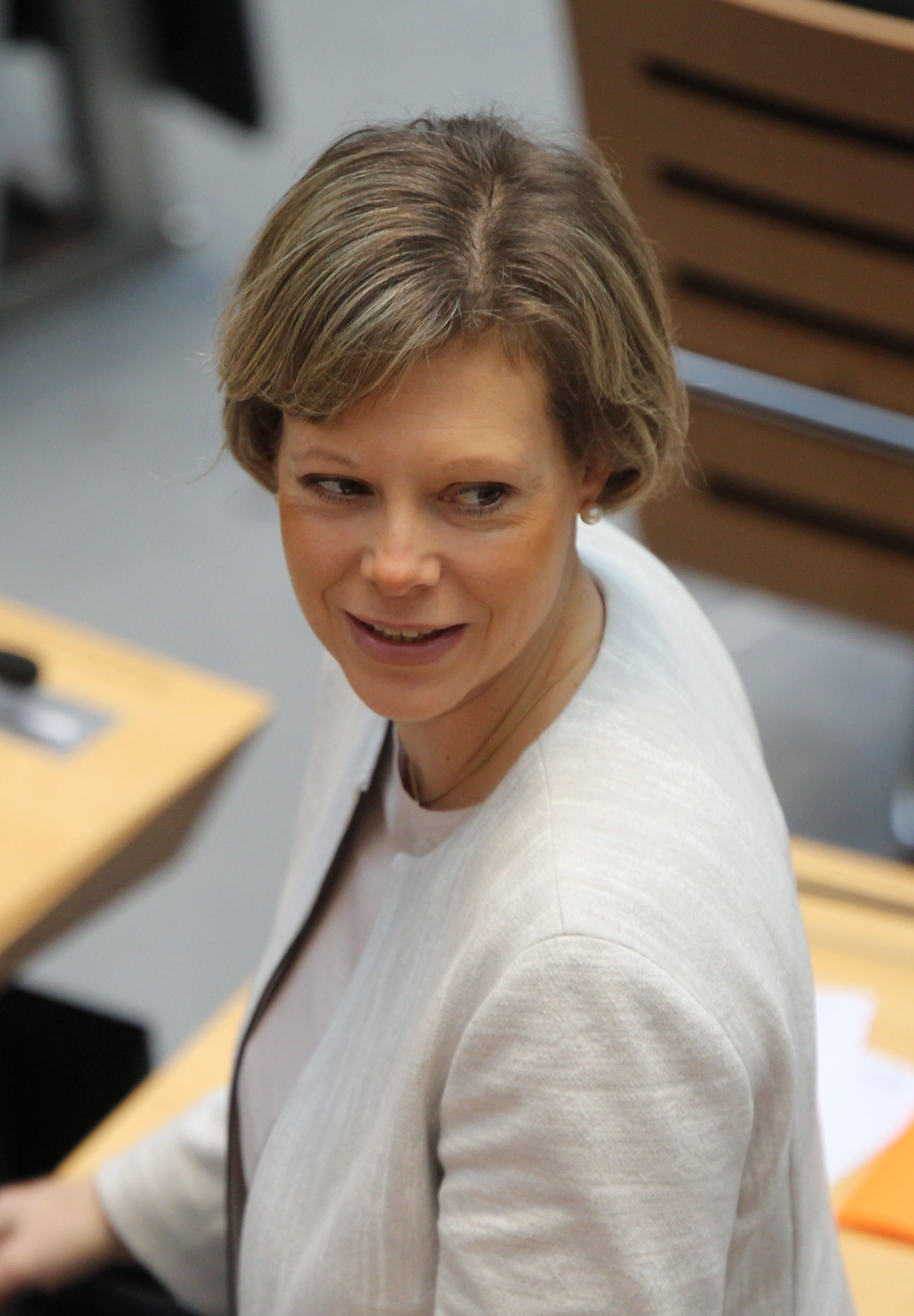 Cornelia Seibeld während der Plenarsitzung des Berliner Abgeordnetenhauses am 8. Dezember 2016